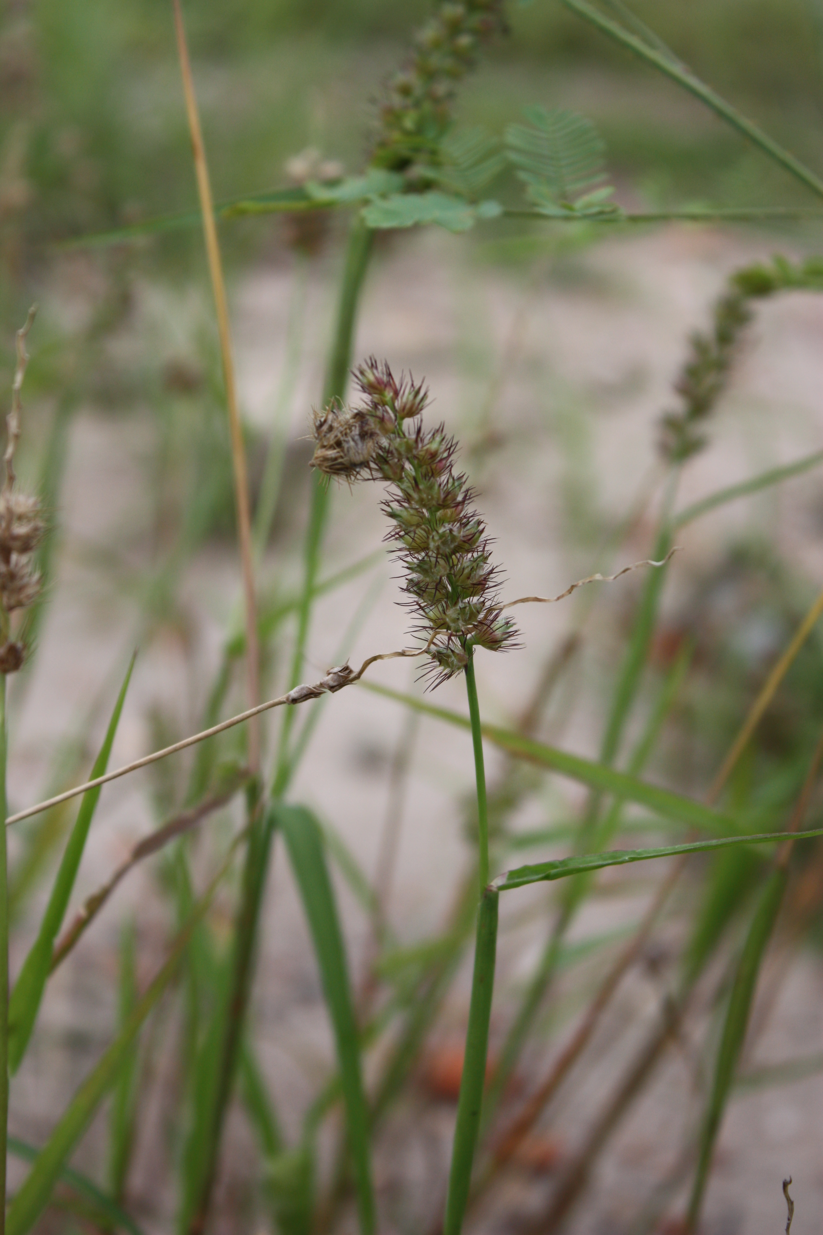 Cenchrus biflorus, near Cotonou, Benin